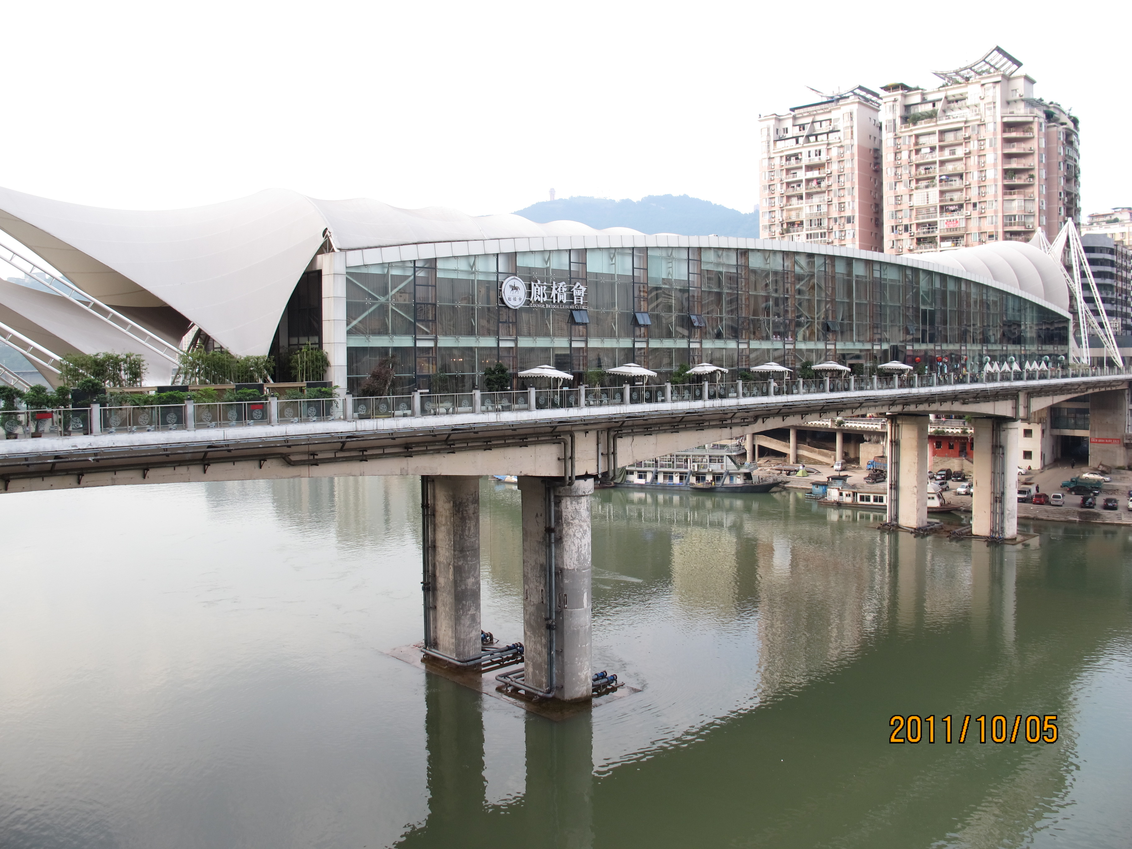 四川 达州市-廊桥